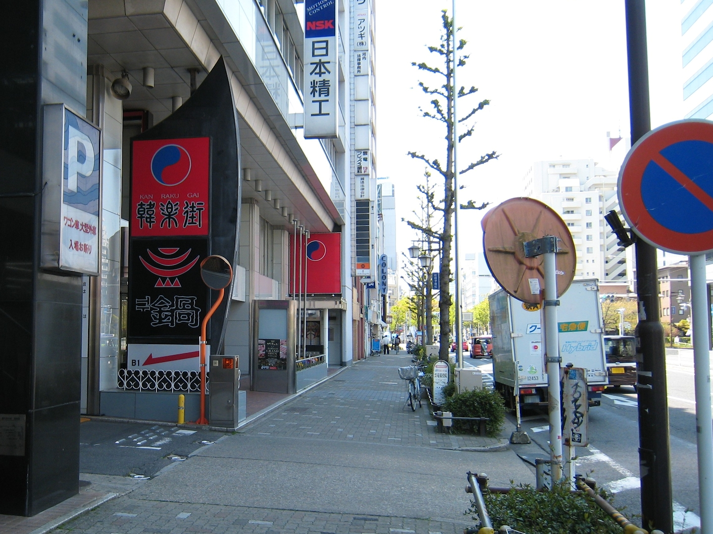 雲竜フレックスビル駐車場入口前・西館入口前